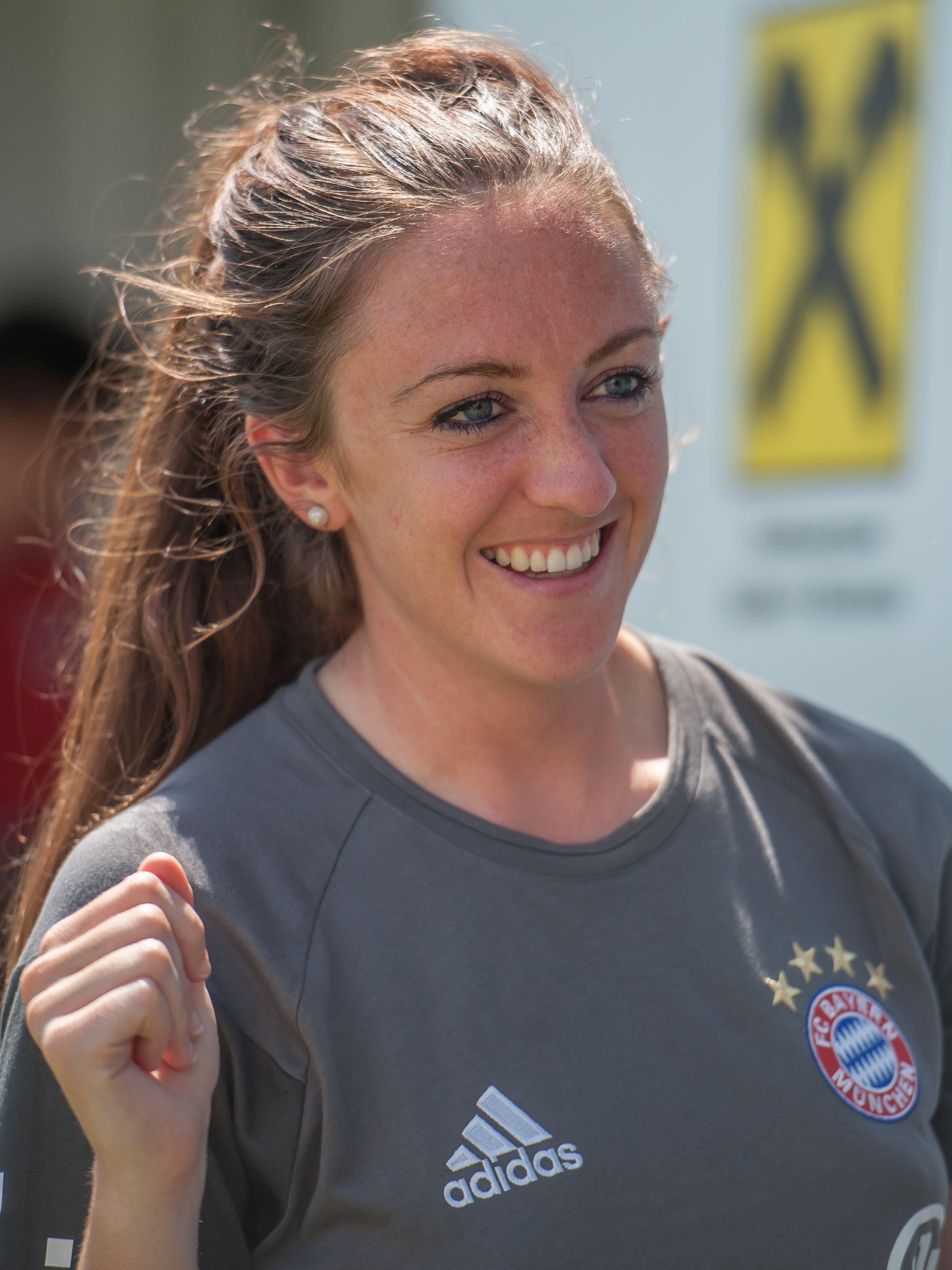 Testspiel SKN St. Pölten vs FC Bayern München am 23. Juli 2016 in Spillern. Bild zeigt Lisa Evans (Bayern Muenchen).